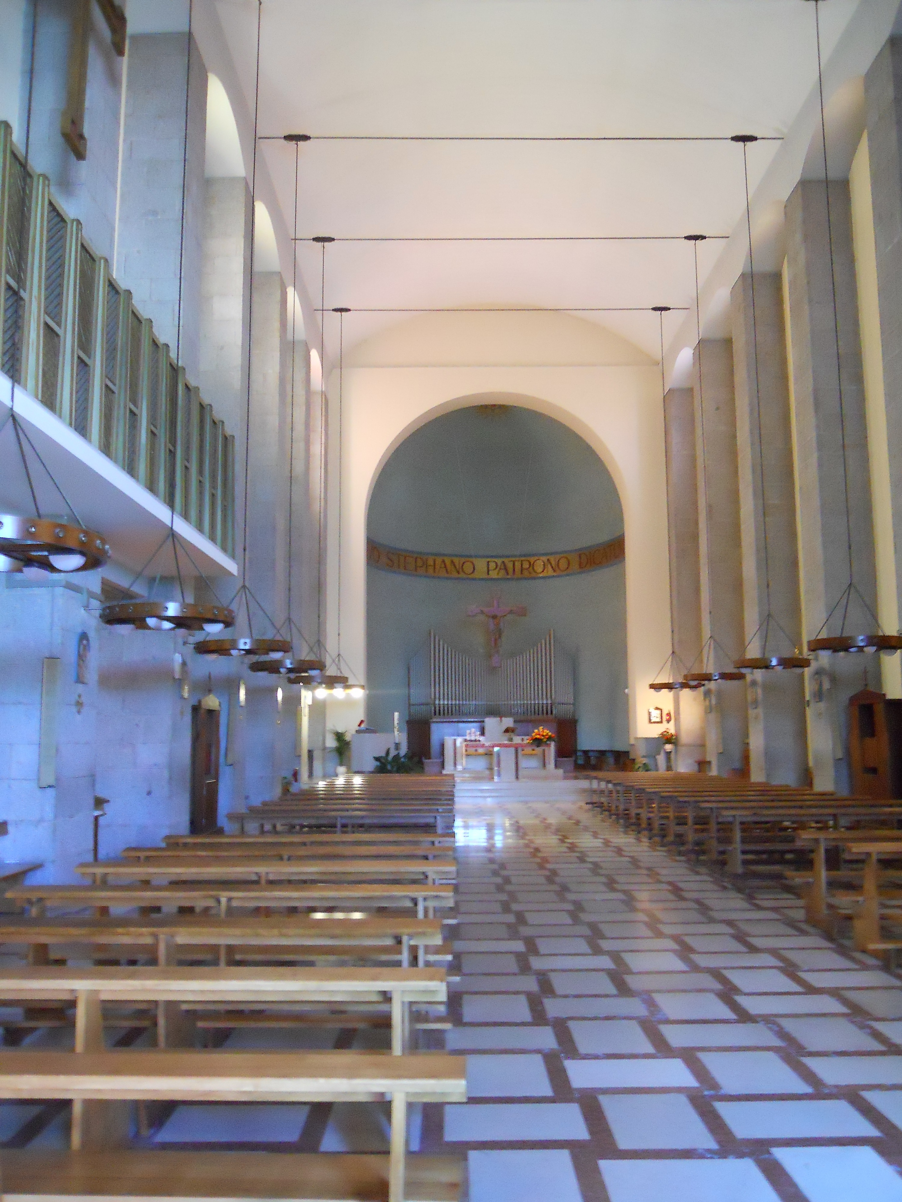 L'interno a navata unica della chiesa arcipretale di Santo Stefano Protomartire a Porto Santo Stefano, in provincia di Grosseto